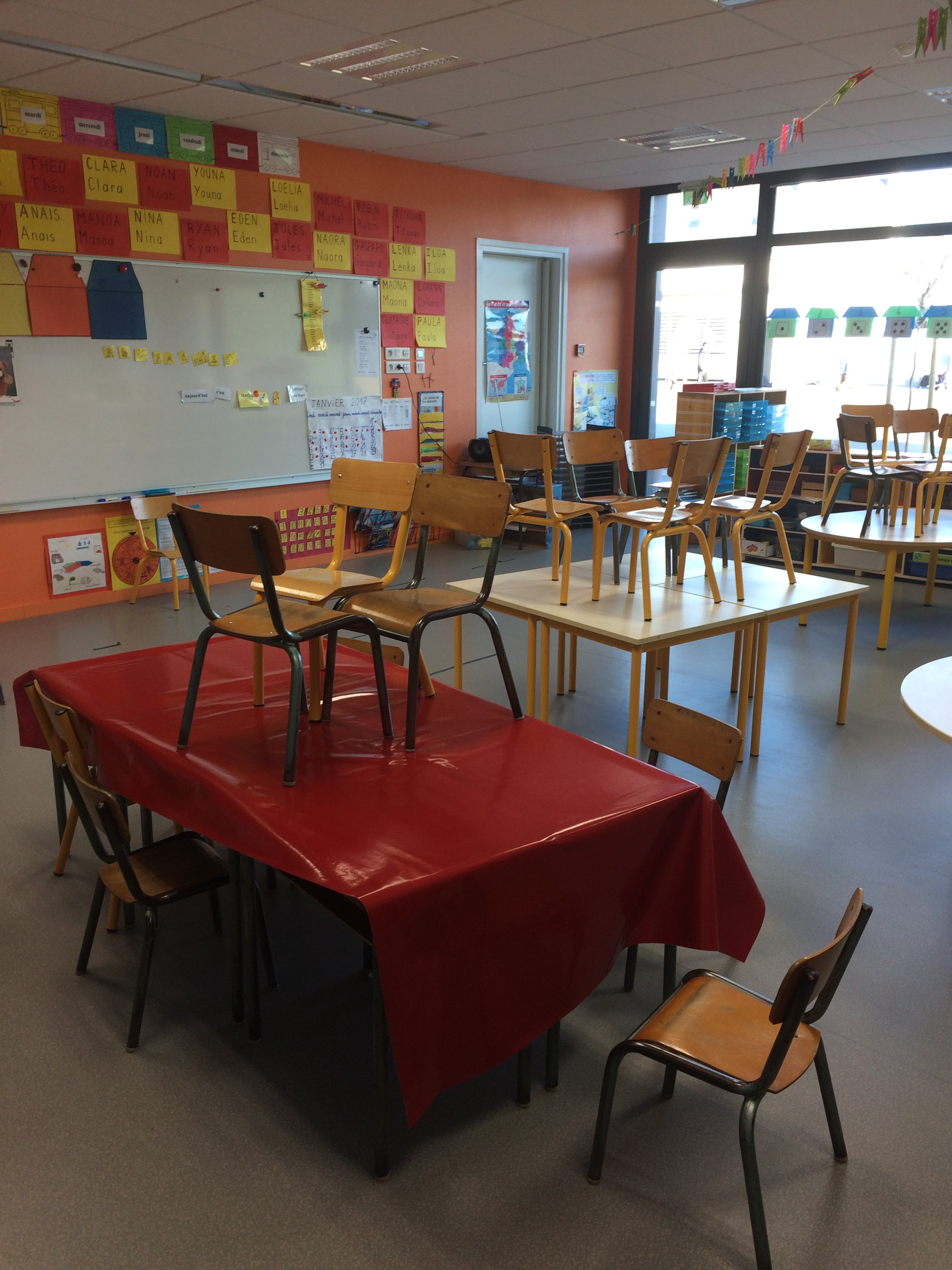 Cette photo représente une classe de moyenne section